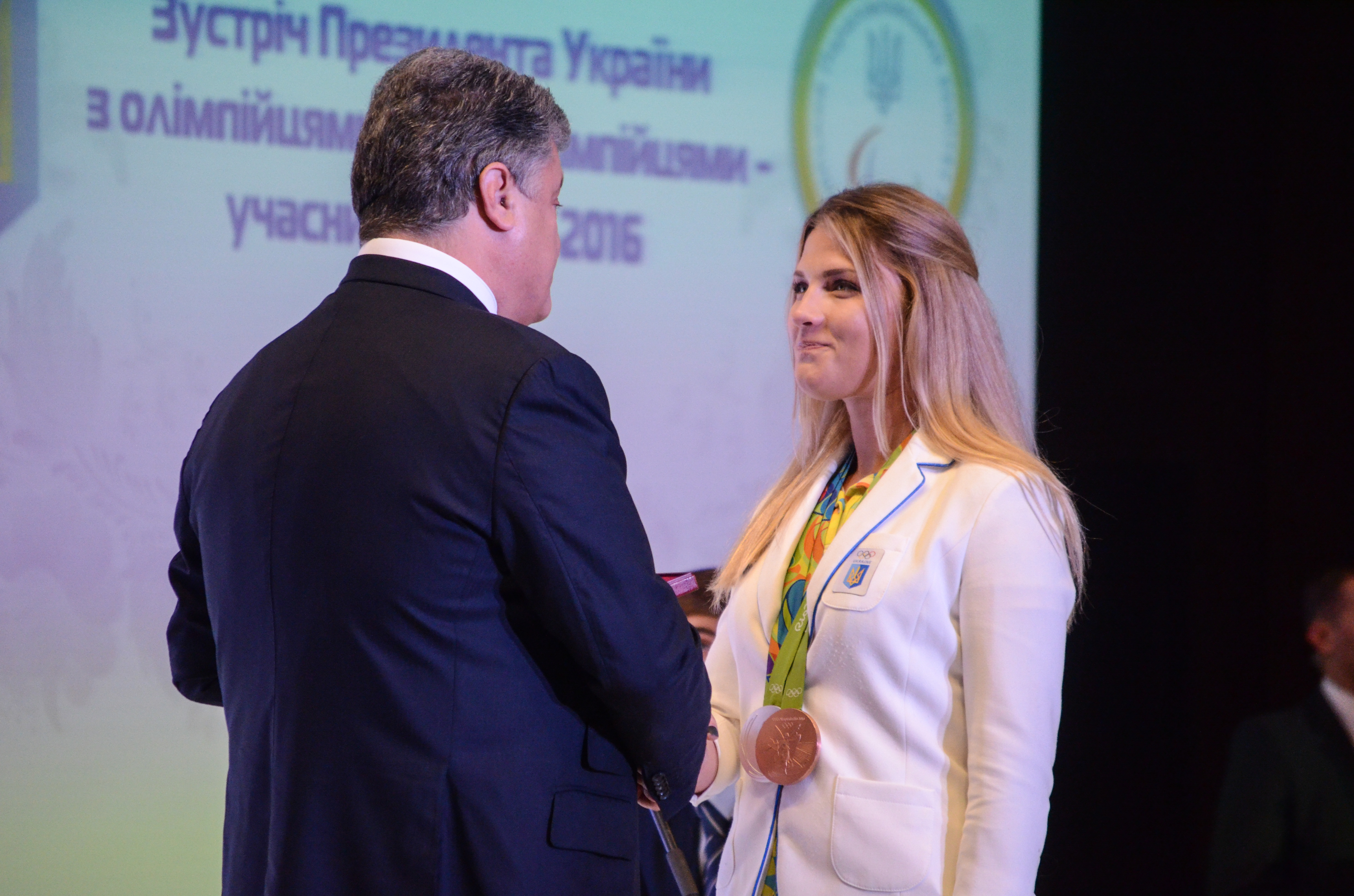 Зустріч Президента України з олімпійцями та паралімпійцями — учасниками Ріо-2016.